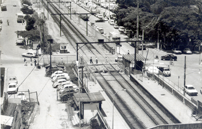 Passagem de nível da Estação Poá nos anos 70